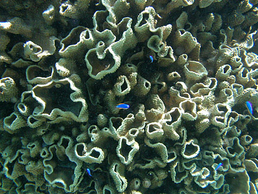 Turbinaria mesenterina, en Parque Nacional de Samoa Americana